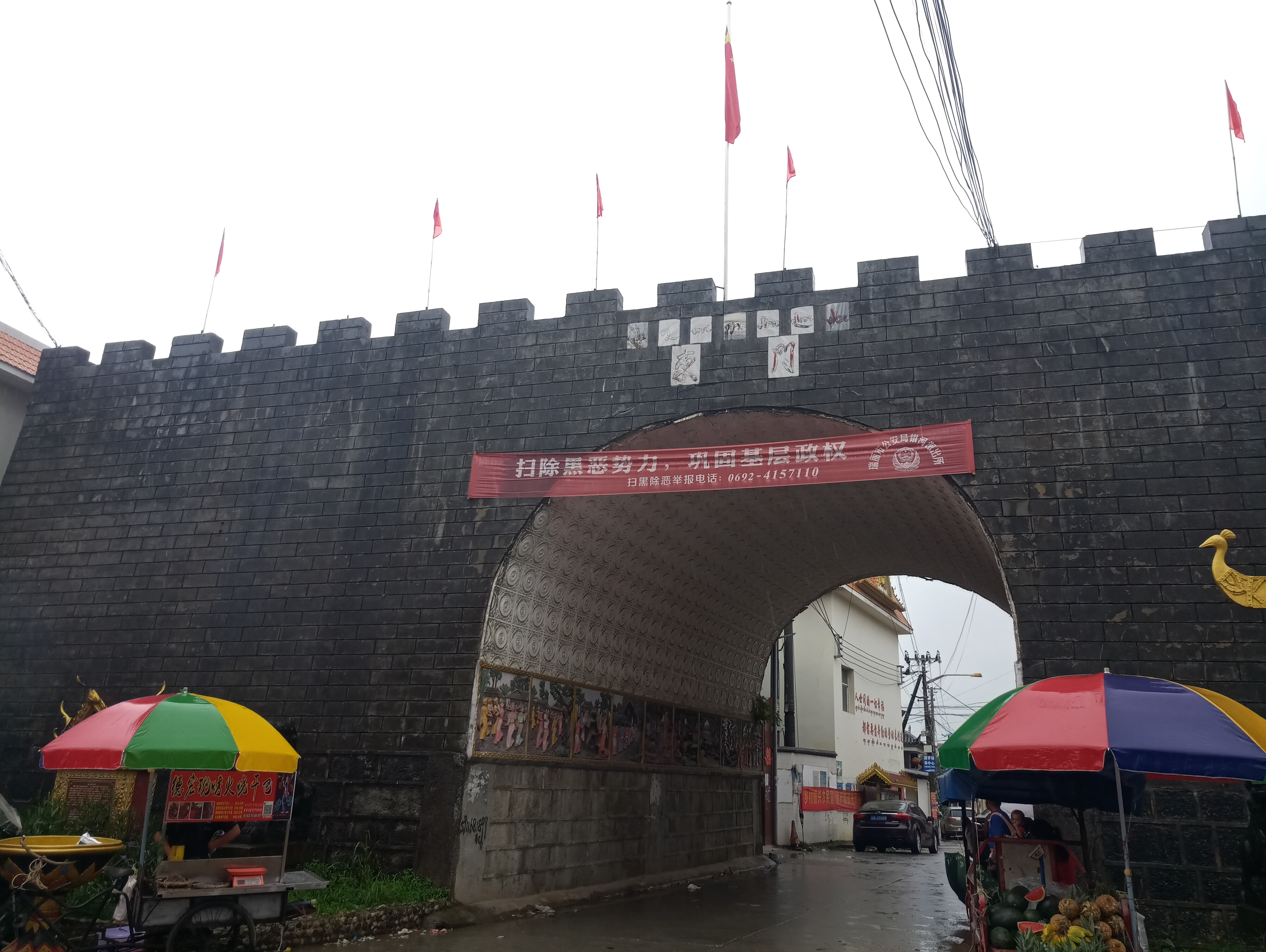 中文（中国大陆）: 平麓城址-东门